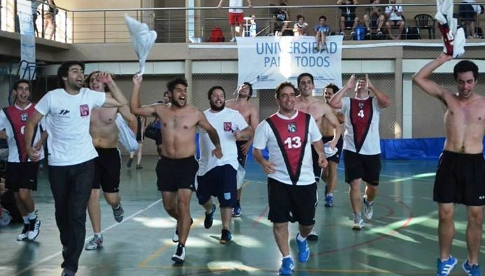 UNLa Campeón Argenino de Handball Masculino - JUAR 2014